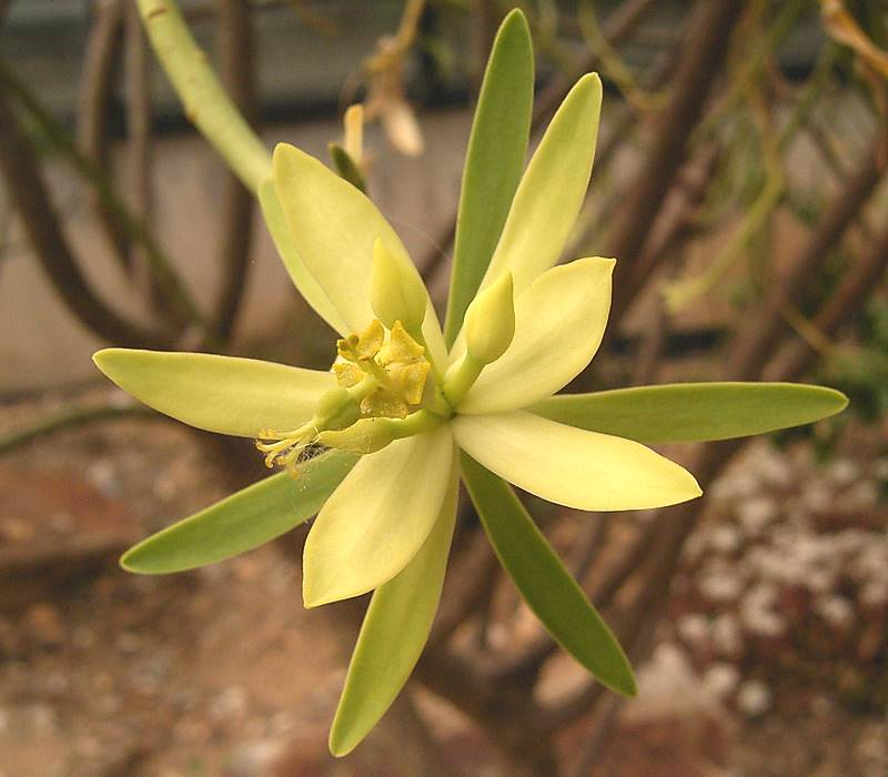 Euphorbia regis-jubae BG Bochum, Germany